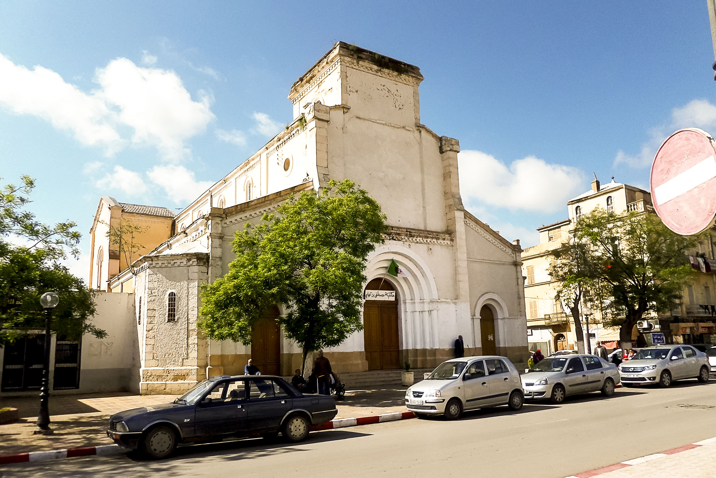 bibliothèque - Mascara المكتبة - معسكر